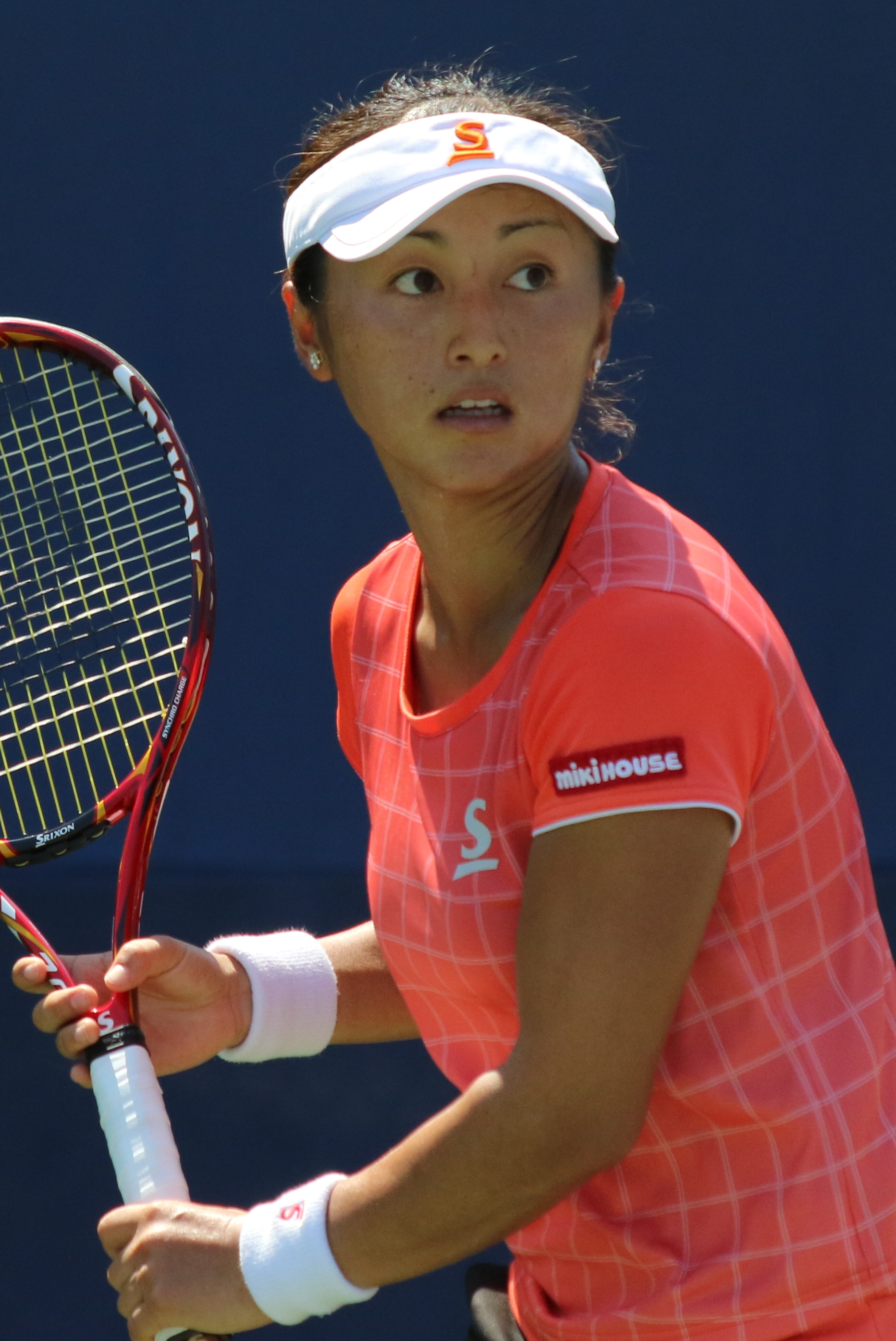 Doi US16 (12)